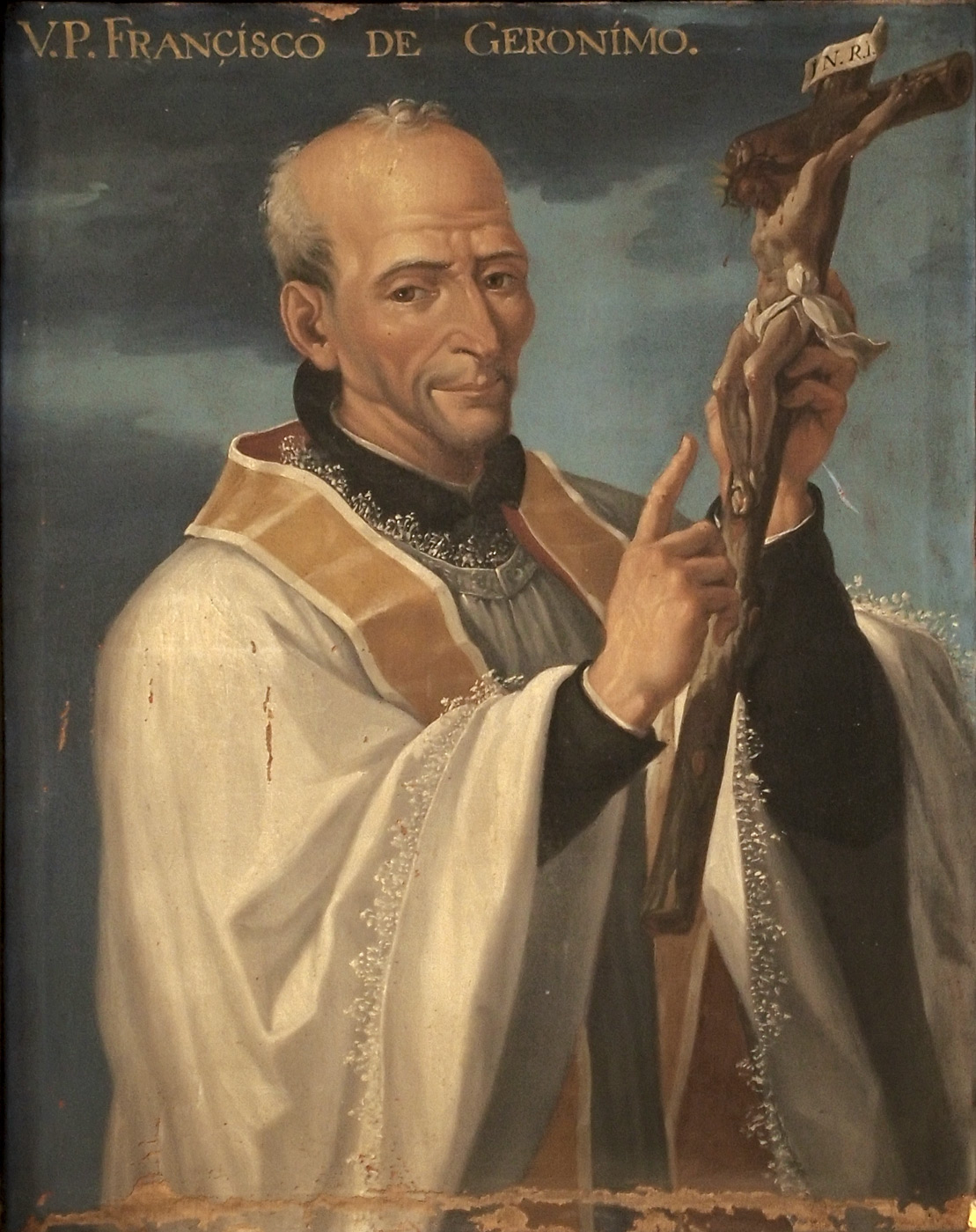 «V(enerable) P(adre) Françisco de Geronimo». Venerable Francisco Jerónimo Simón; s. XVII; pintor anónimo. Sacristía de la iglesia de San Miguel, Valladolid.